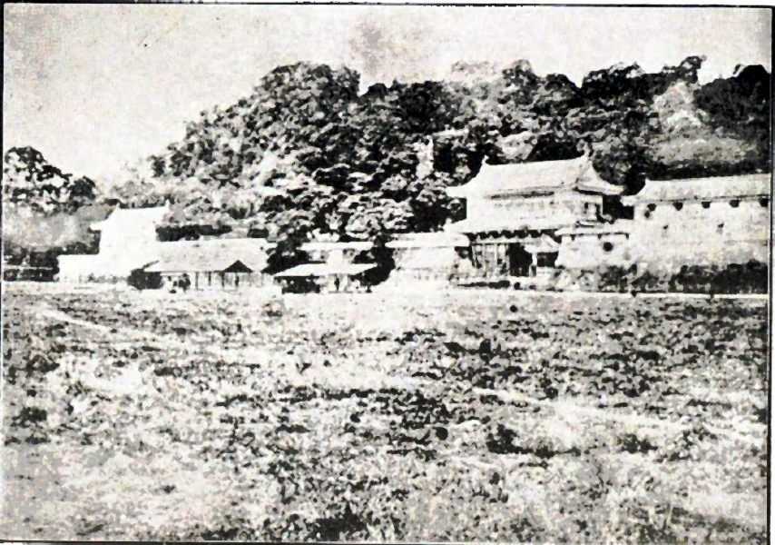 鹿児島城の写真。1873年に城内の施設が焼失していることから、1873年以前に撮影されたものとみられる。